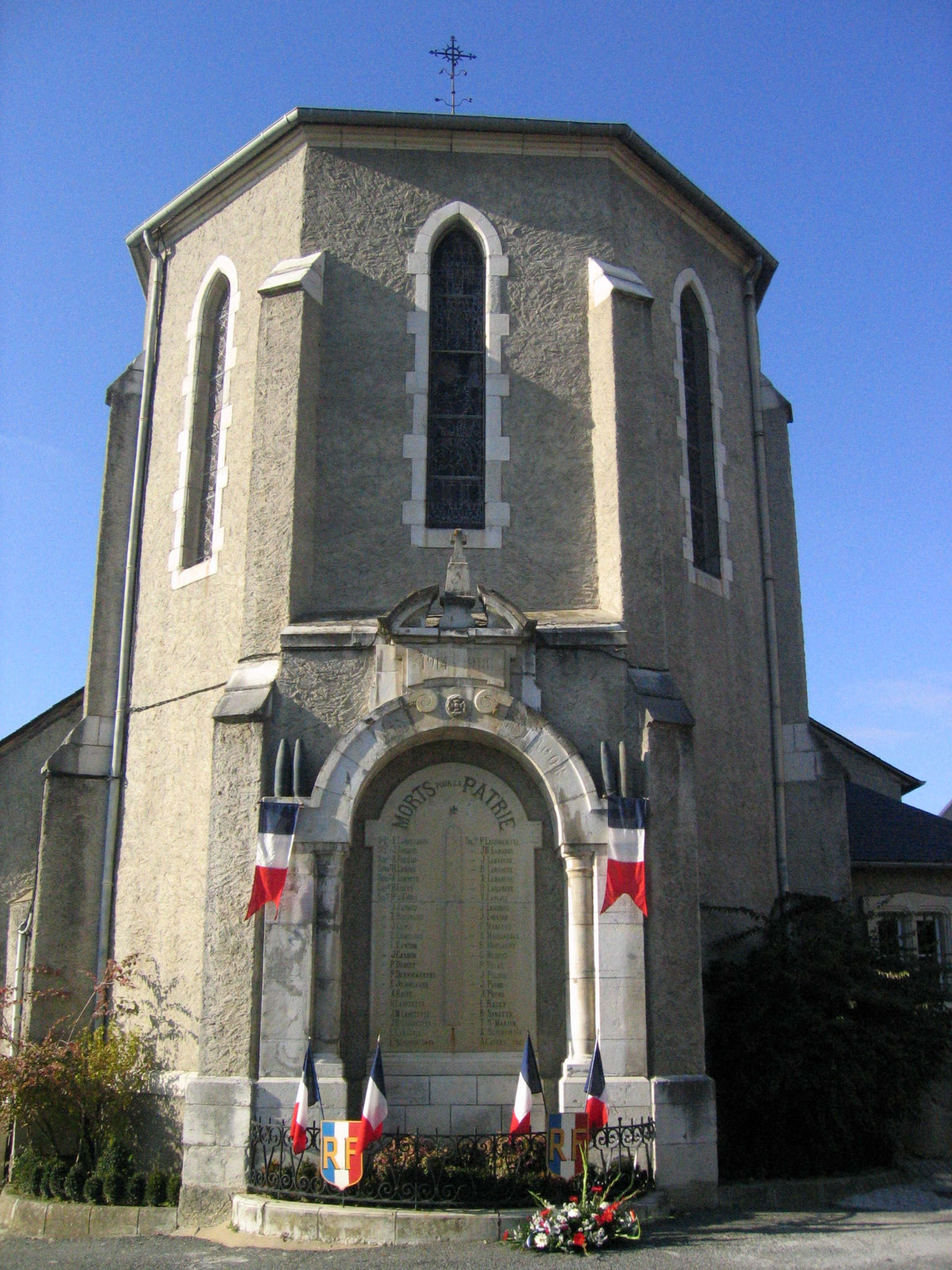 Monument aux morts et église de Lagor (Pyrénées-Atlantiques, France)